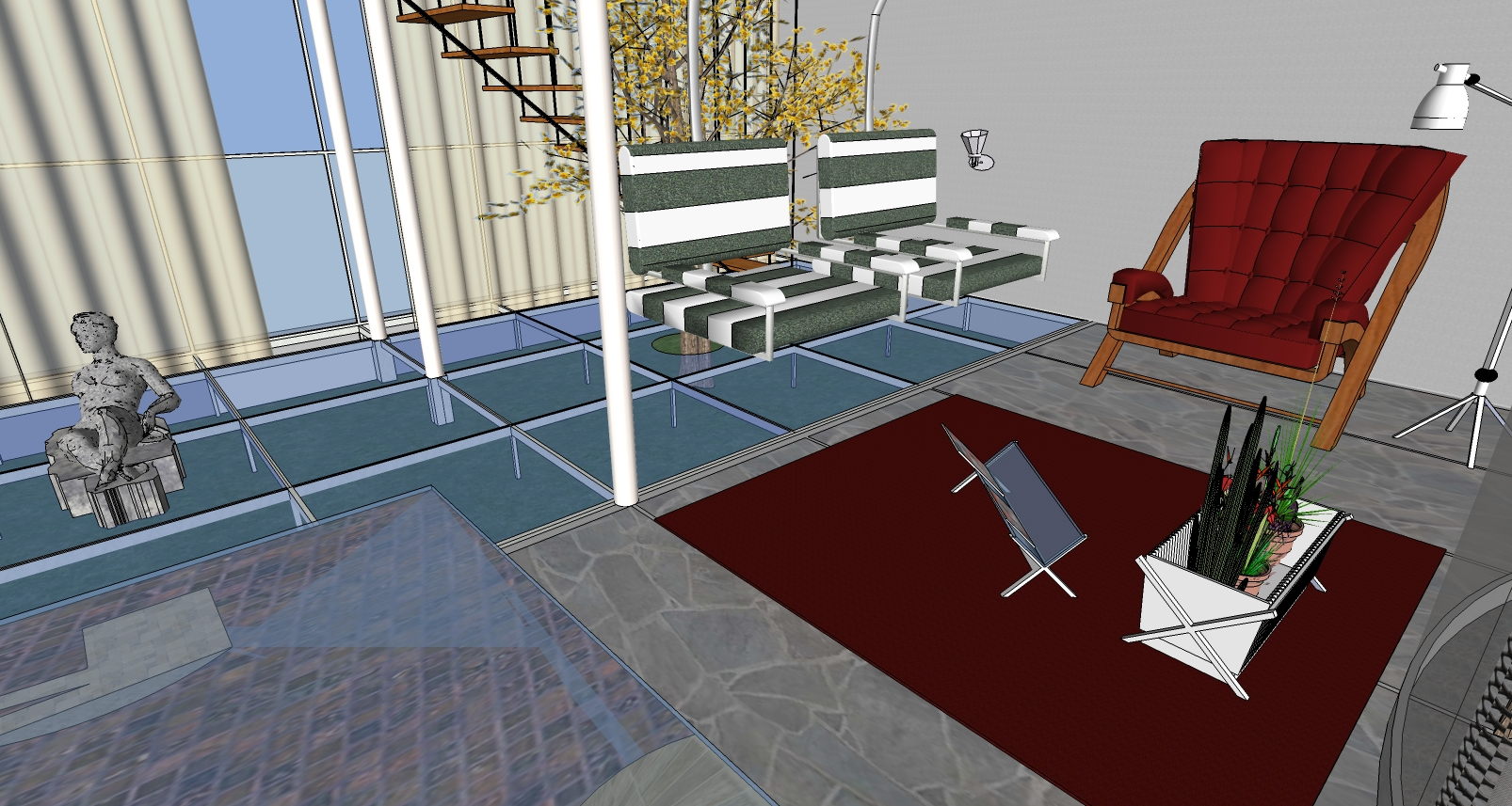 vii triennale